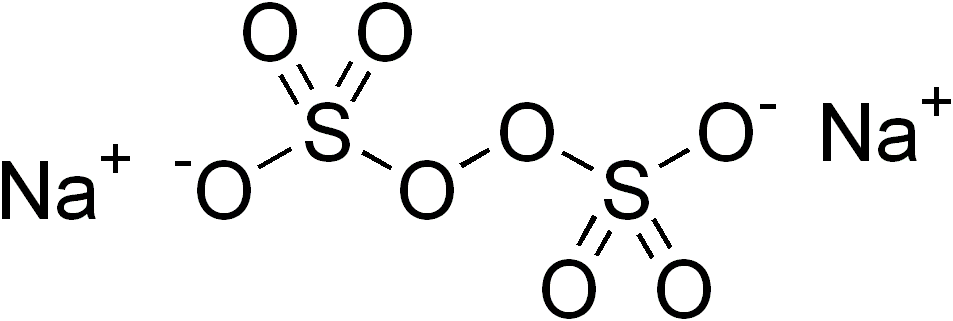 Darstellung zeigt die Strukturformel von Natriumpersulfat